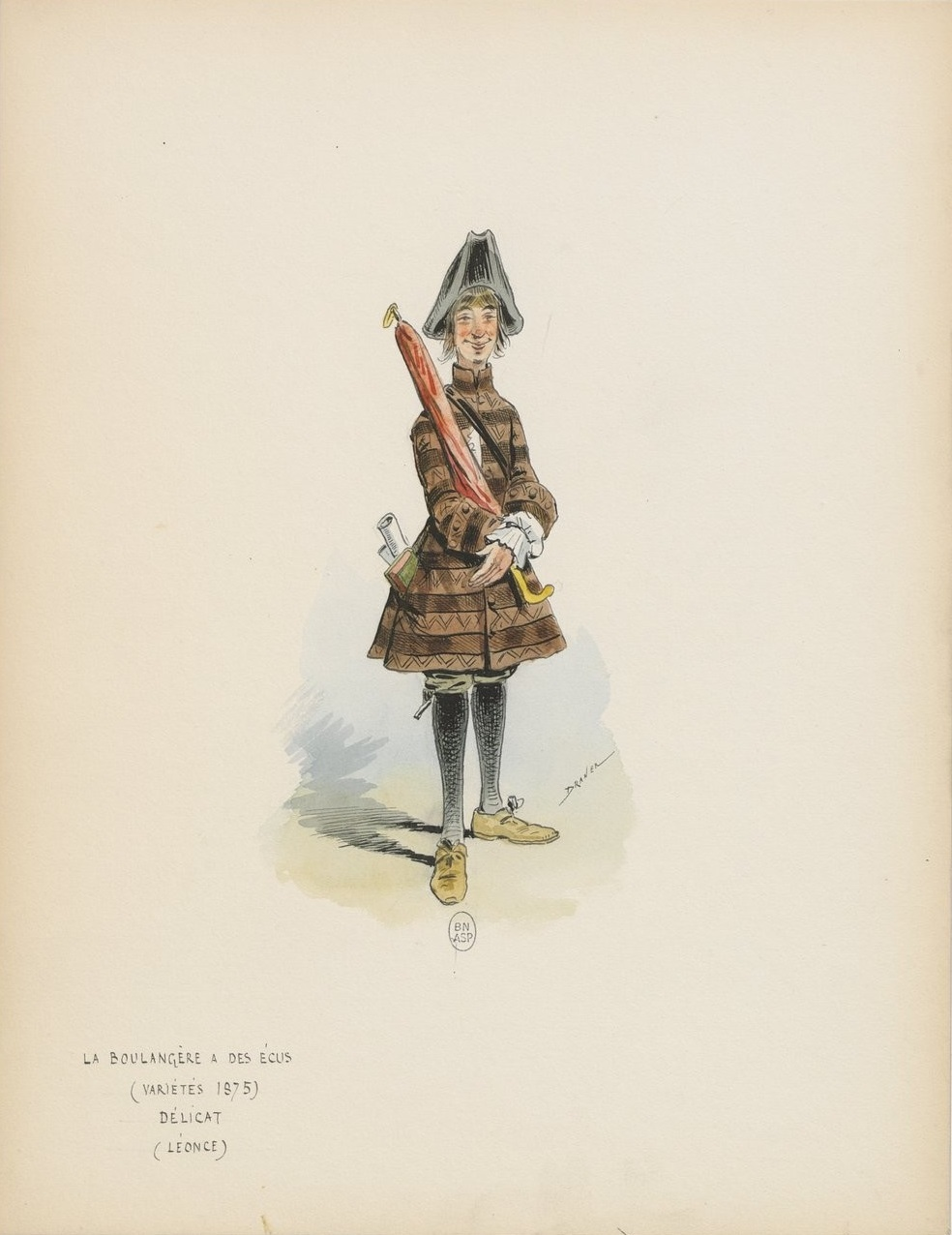 La boulangère a des écus, opéra-bouffe de Meilhac, Halévy et Offenbach : Léonce (Délicat) : dessin de Draner